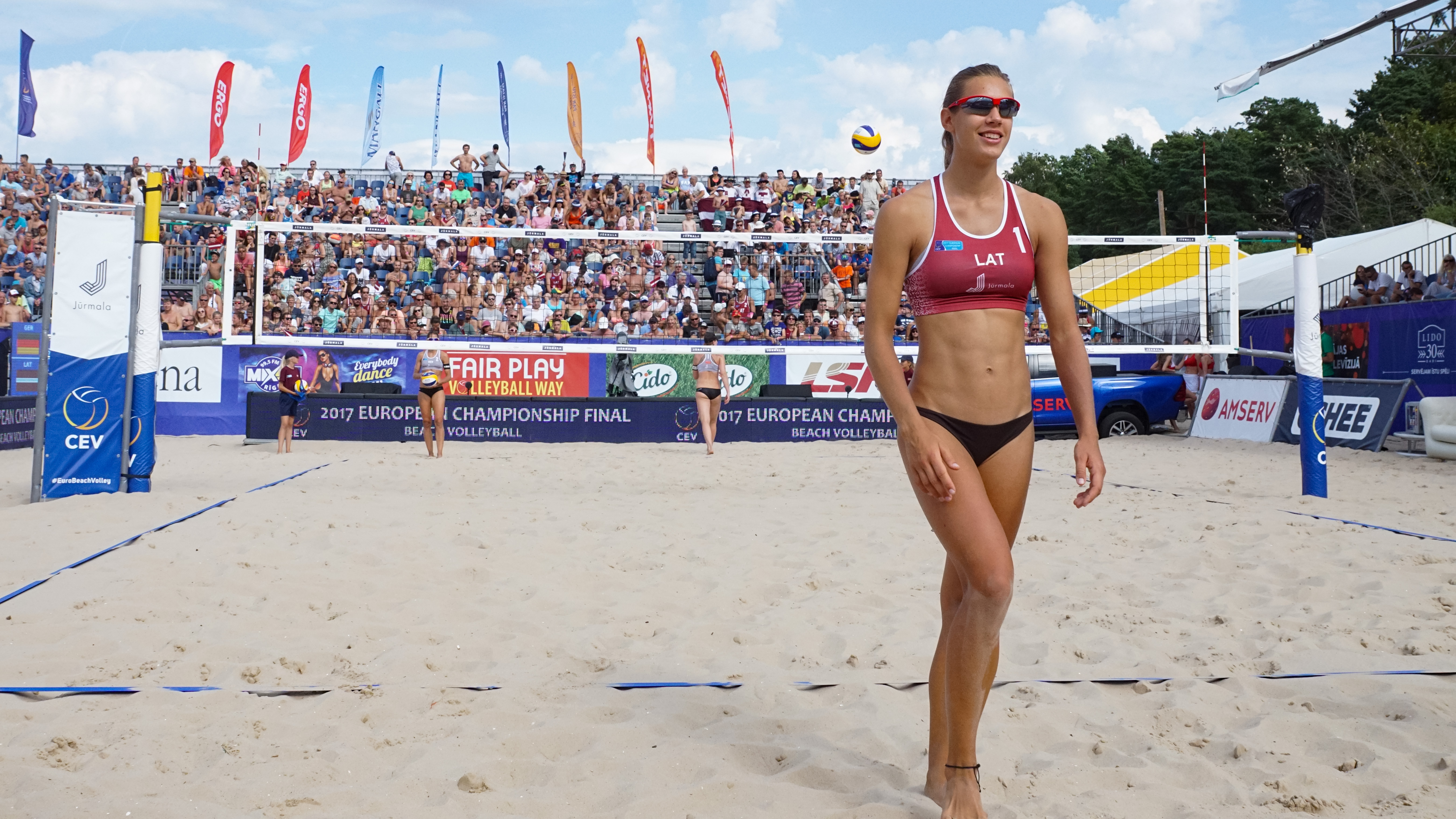 Tīna Laura Graudiņa - Latvijas pludmales volejboliste, 2018.gada Eiropas U22 čempionāta sudraba medaļniece